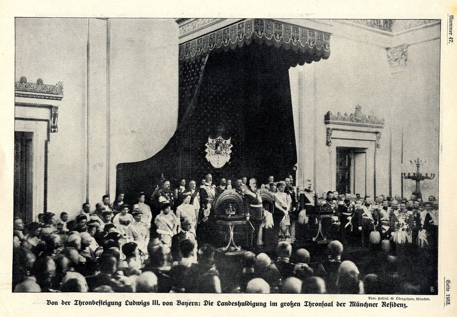 Die Thronbesteigung König Ludwigs III. von Bayern